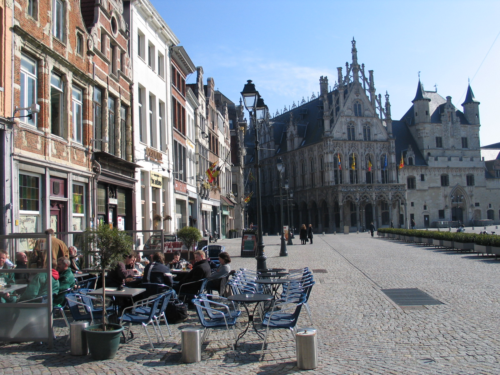 Markt in Mechelen - eigen foto